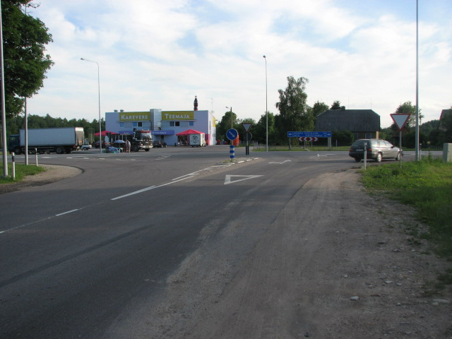 Kärevere rist Kärka poolt